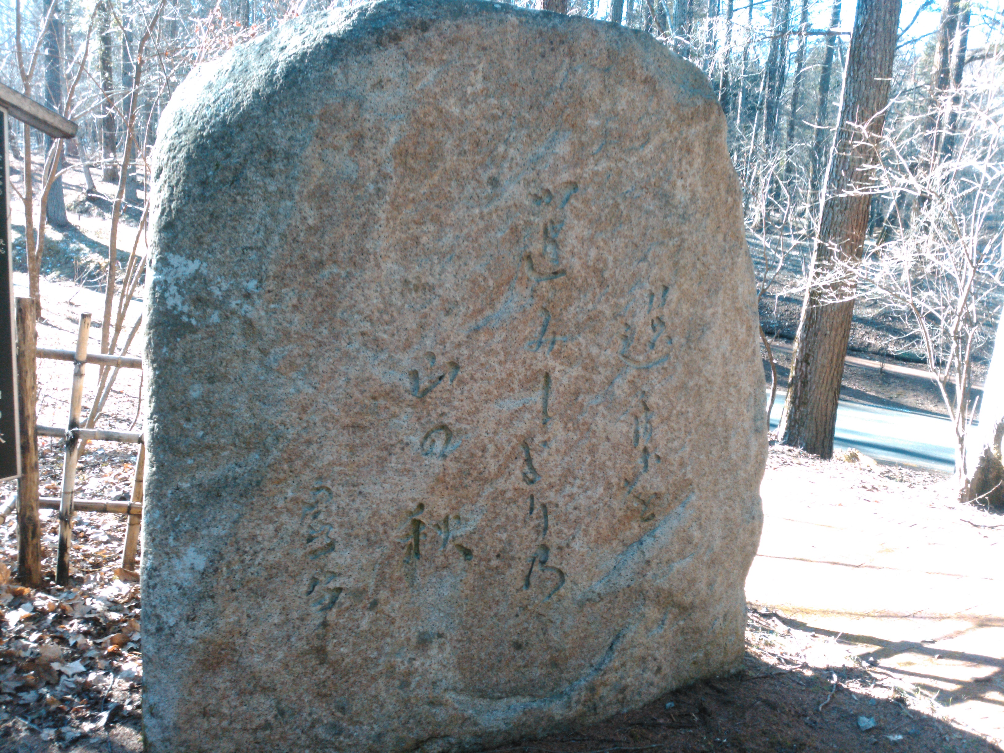 文学の小径 - 高浜虚子句碑「撰集を 選みしよりの 山の秋」